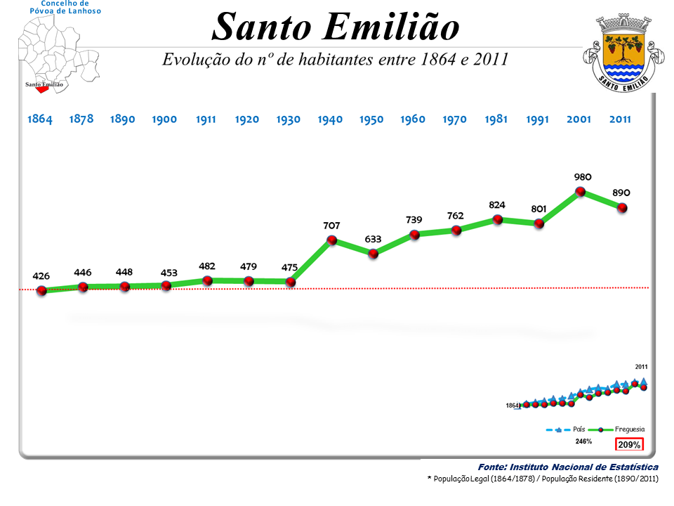 Censos 1864/2011